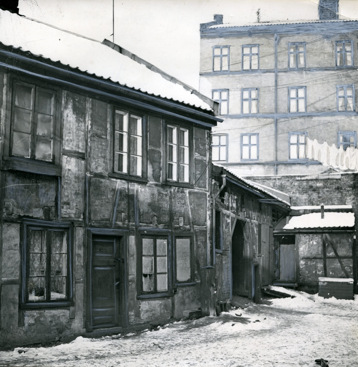 Bakgård i Holmens gate i Vika. Fra Enga til Bakkegaten, februar 1954